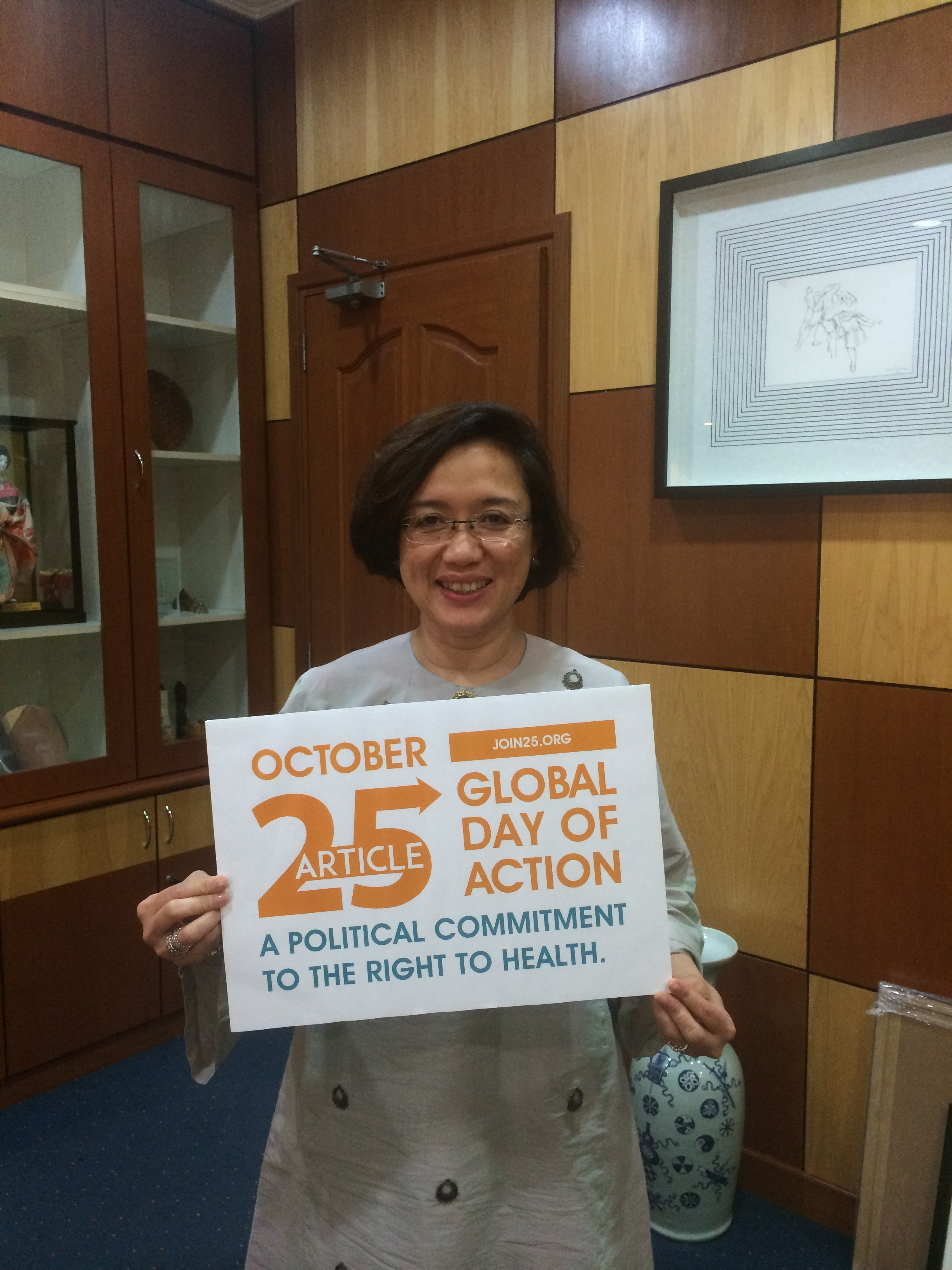 Kuala Lumpur, Malaysia